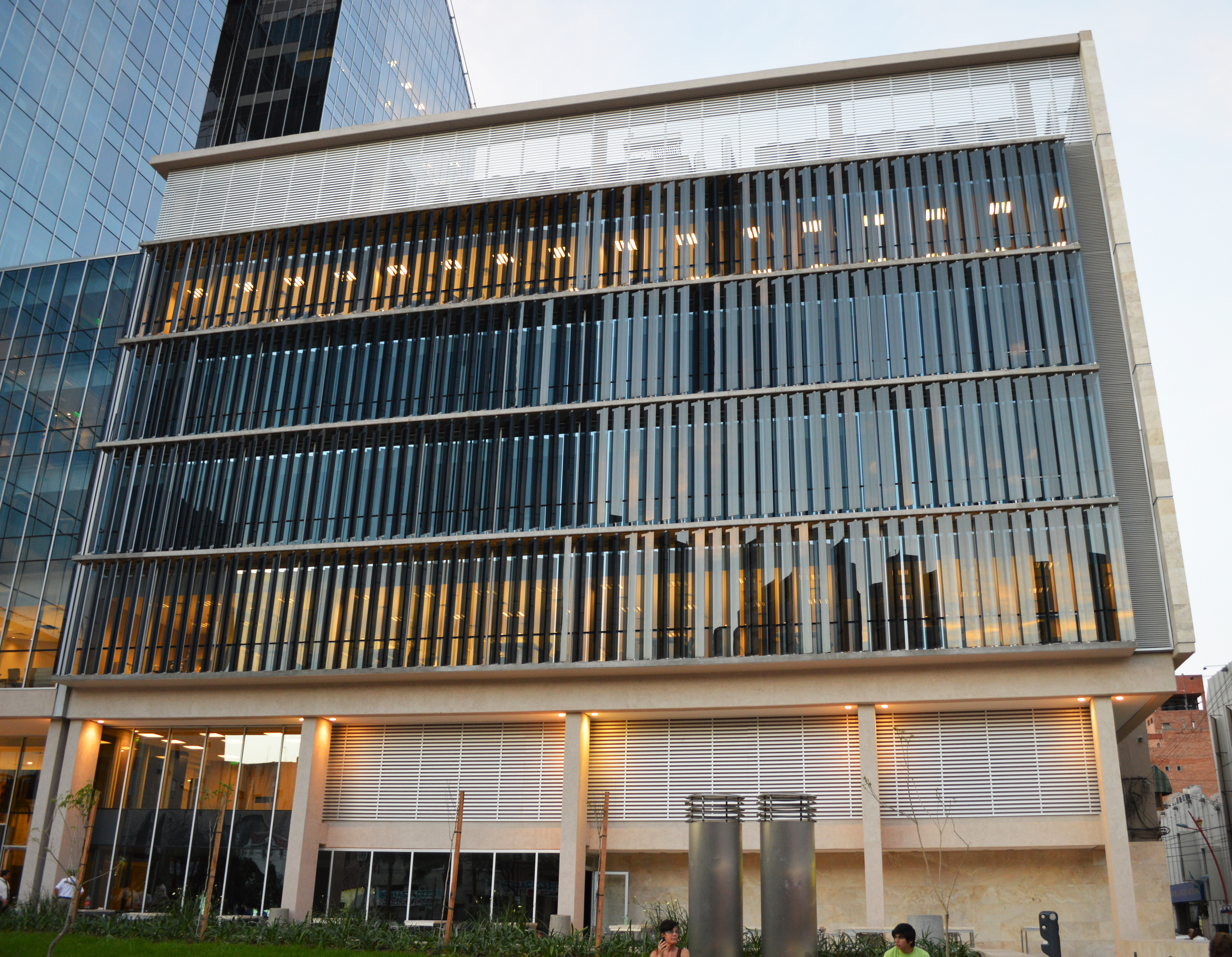 Edificio de la Caja Social, de 5 pisos. Es la torre de menor altura del Complejo Juan Felipe Ibarra, de la ciudad de Santiago del Estero, Argentina.